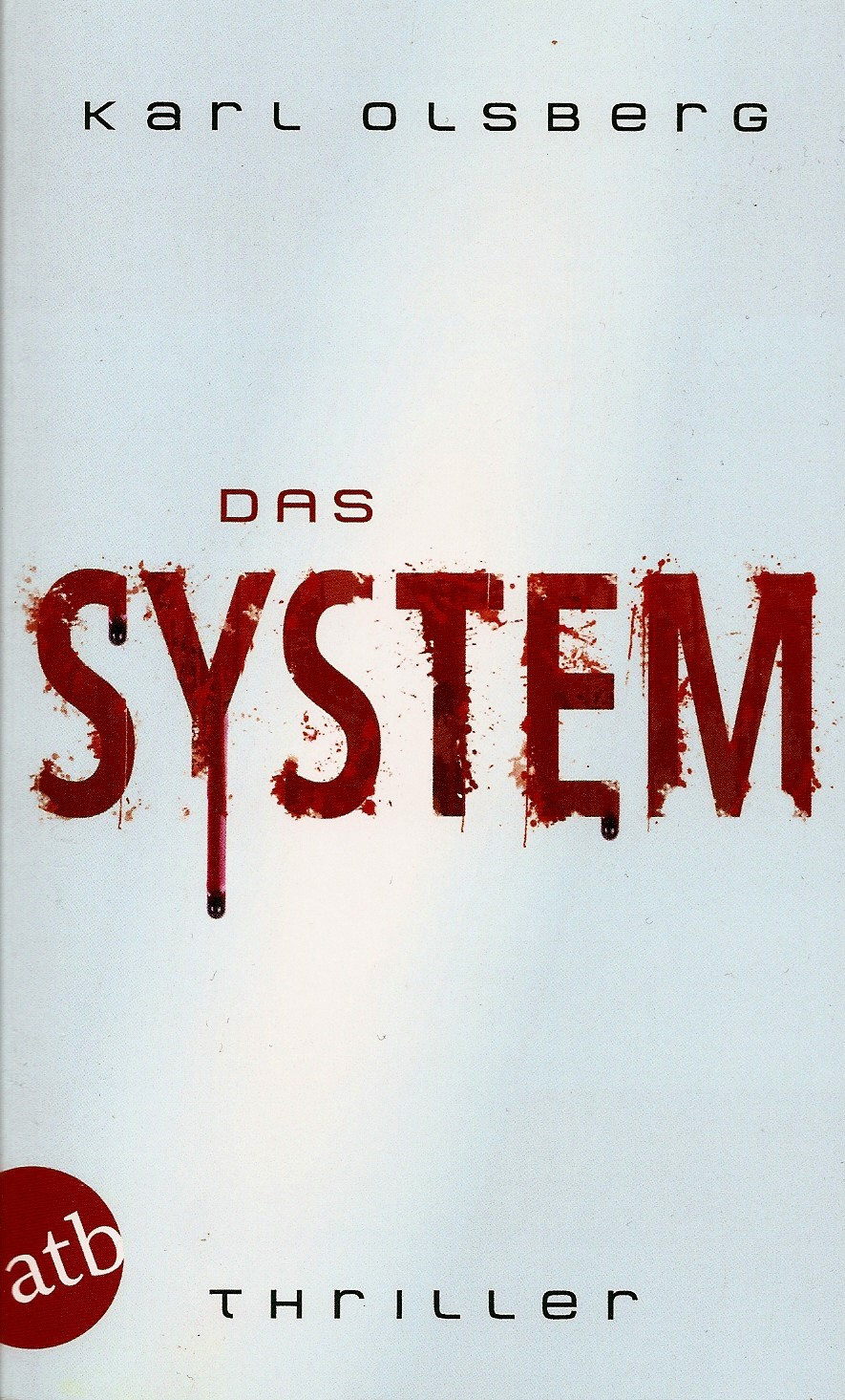 Bucheinband „Das System“ von K. Olsberg (Vorderseite) 2018